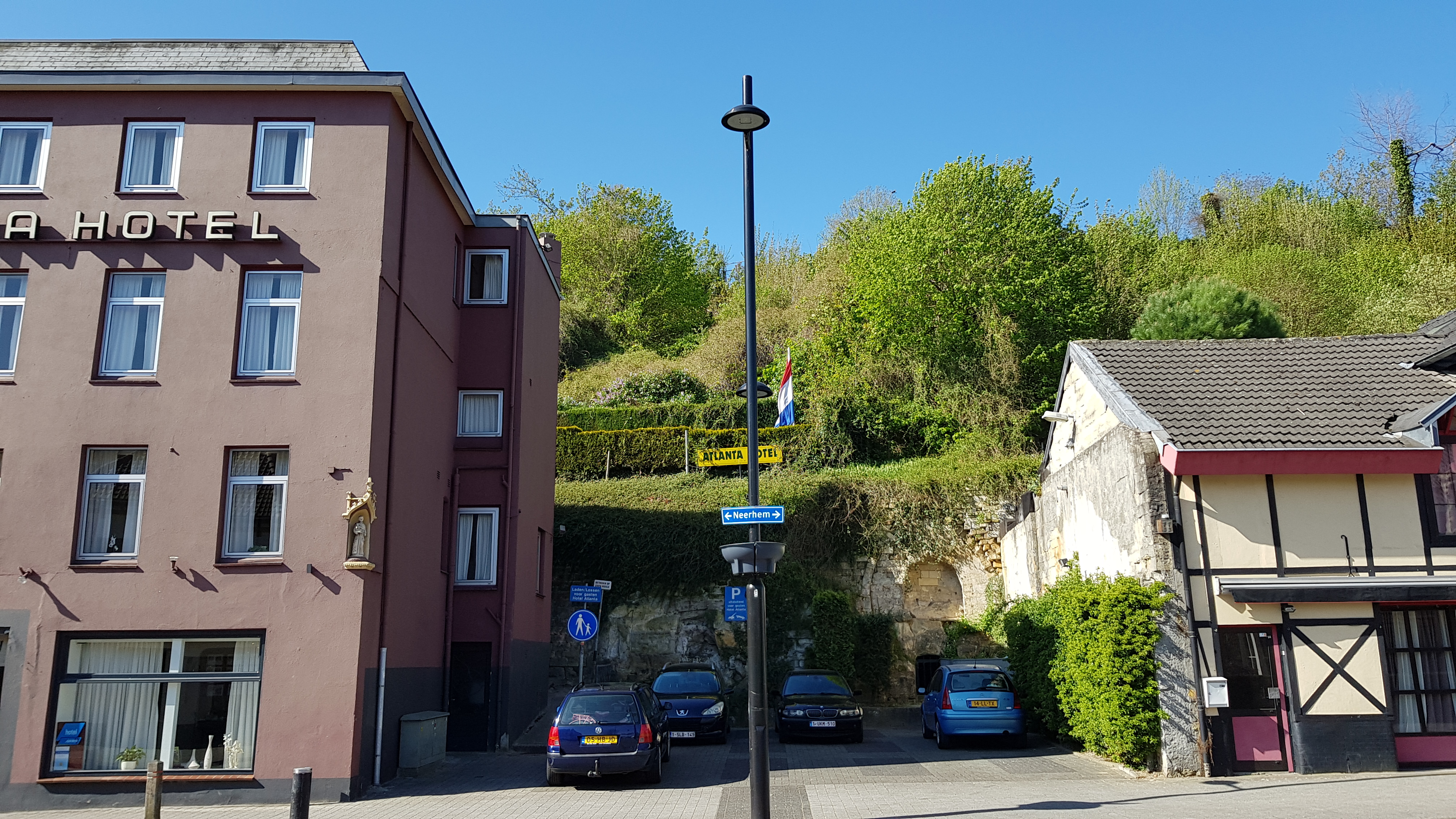 noordoostelijke uitgang Proeftunnel Daelhemerweg bij Hotel Atlanta, Valkenburg, Nederland